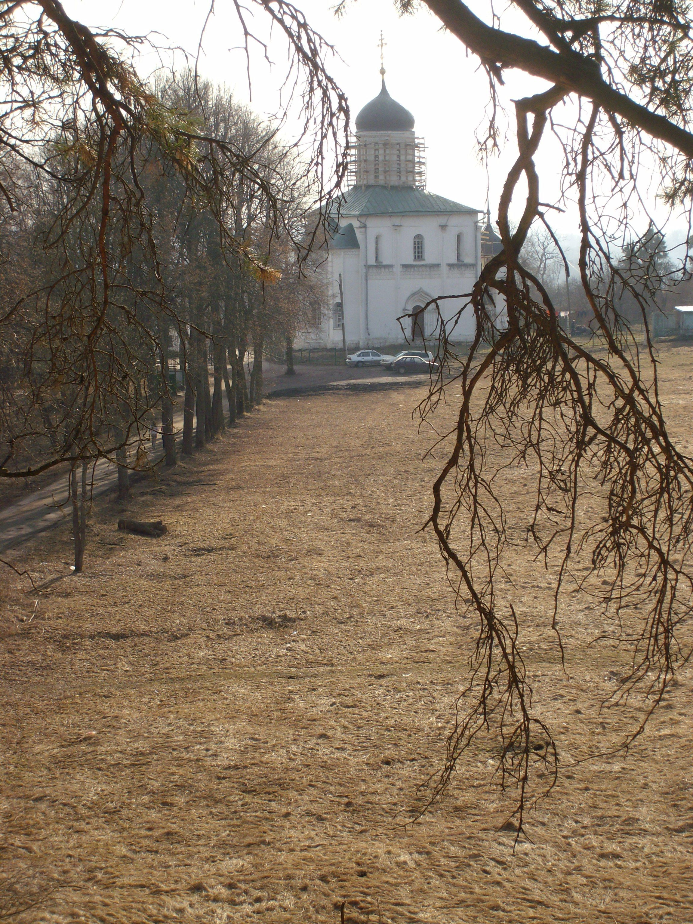 Успенский собор на Городке в Звенигороде. Около 1399 года.